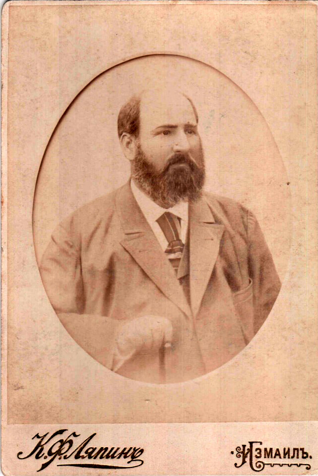 Іоан Іоахимович Авраамов. Ізмаїльський міський голова 1909-1911 рр. Фотокопія.